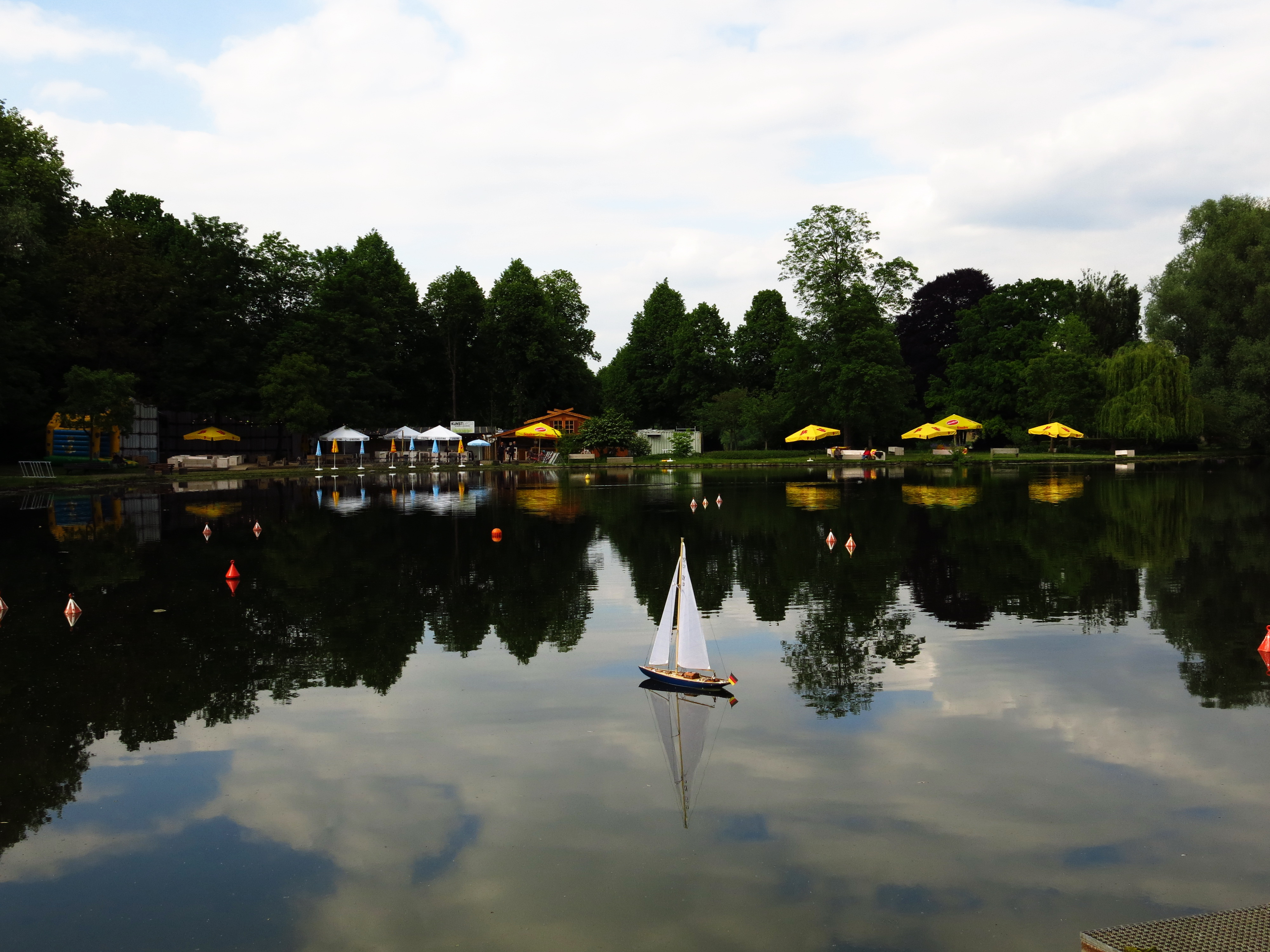 Blindengarten in der Bonner Rheinaue.